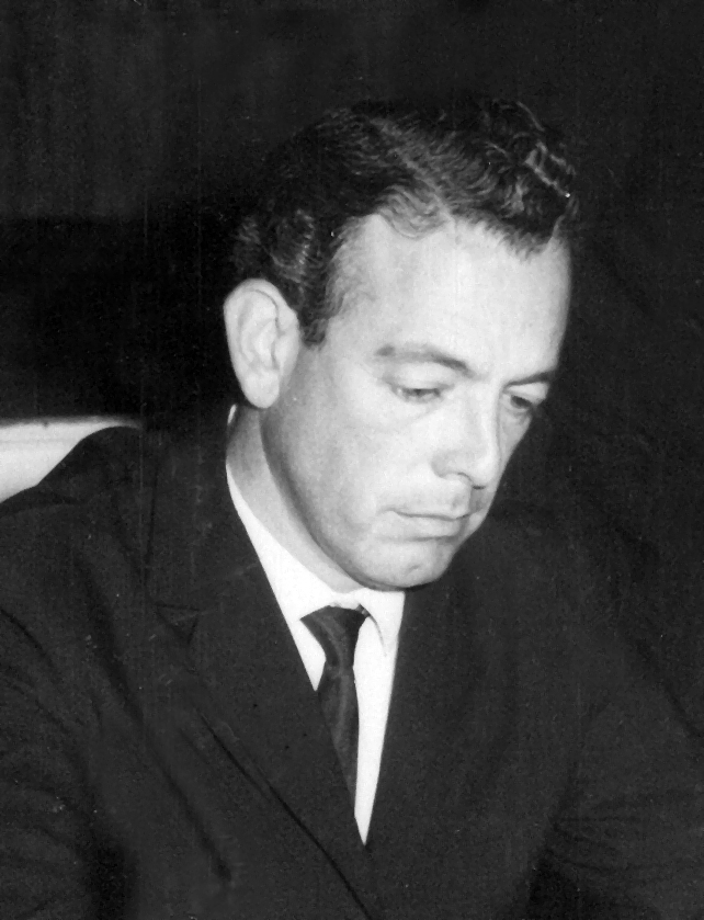 Fernando Cruz Pimentel, Prefeito de Avaré, São Paulo, Brasil década de 60 - 1º mandato